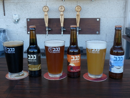 נגב פורטר אלון, נגב אמבר אייל ונגב אואזיס